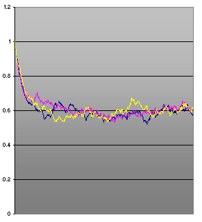 Pfade eines CIR-Prozesses.